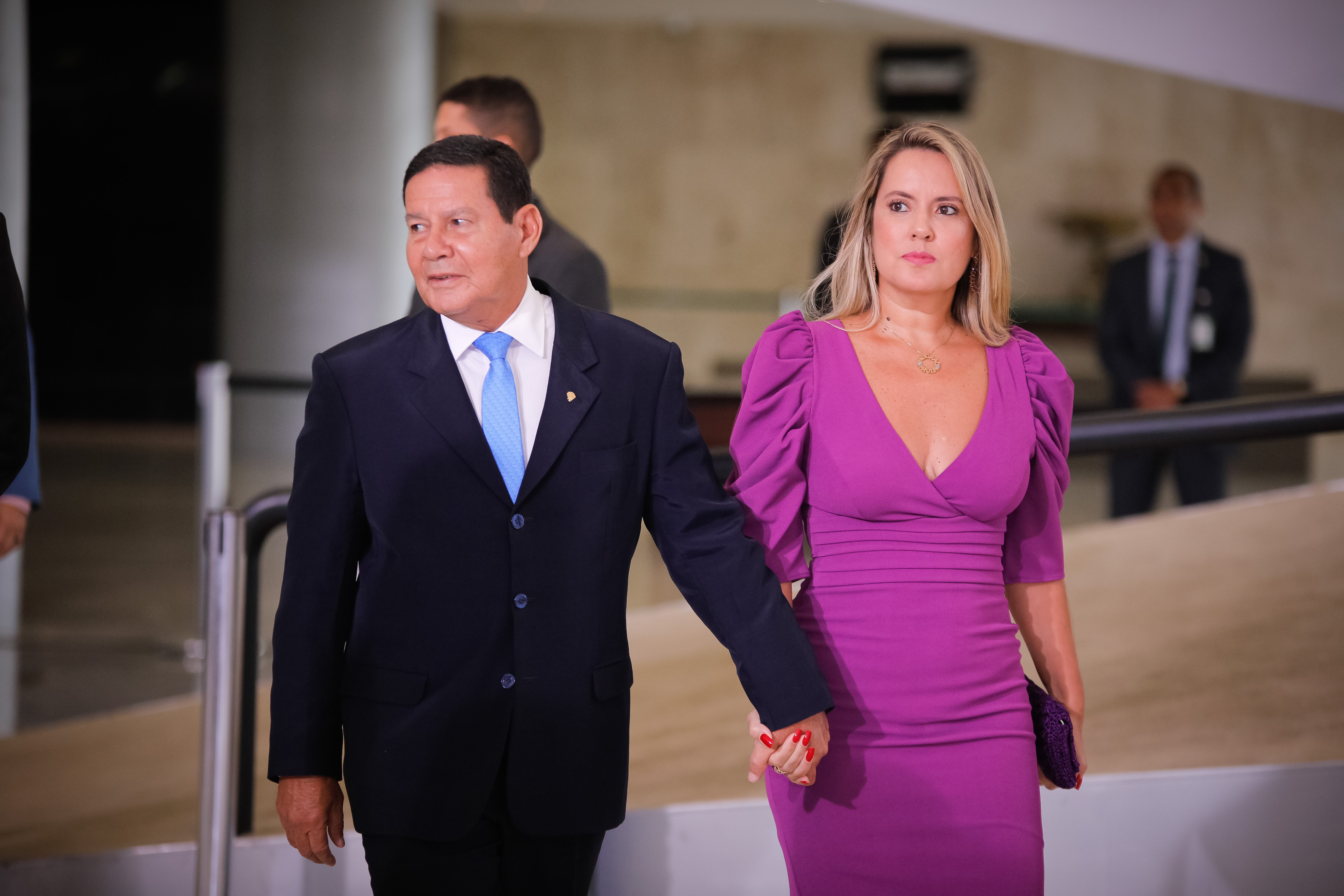 (Brasília-DF, 06/03/2019) Vice-Presidente da República, Hamilton Mourão, durante Cerimônia alusiva ao Dia Internacional da Mulher.